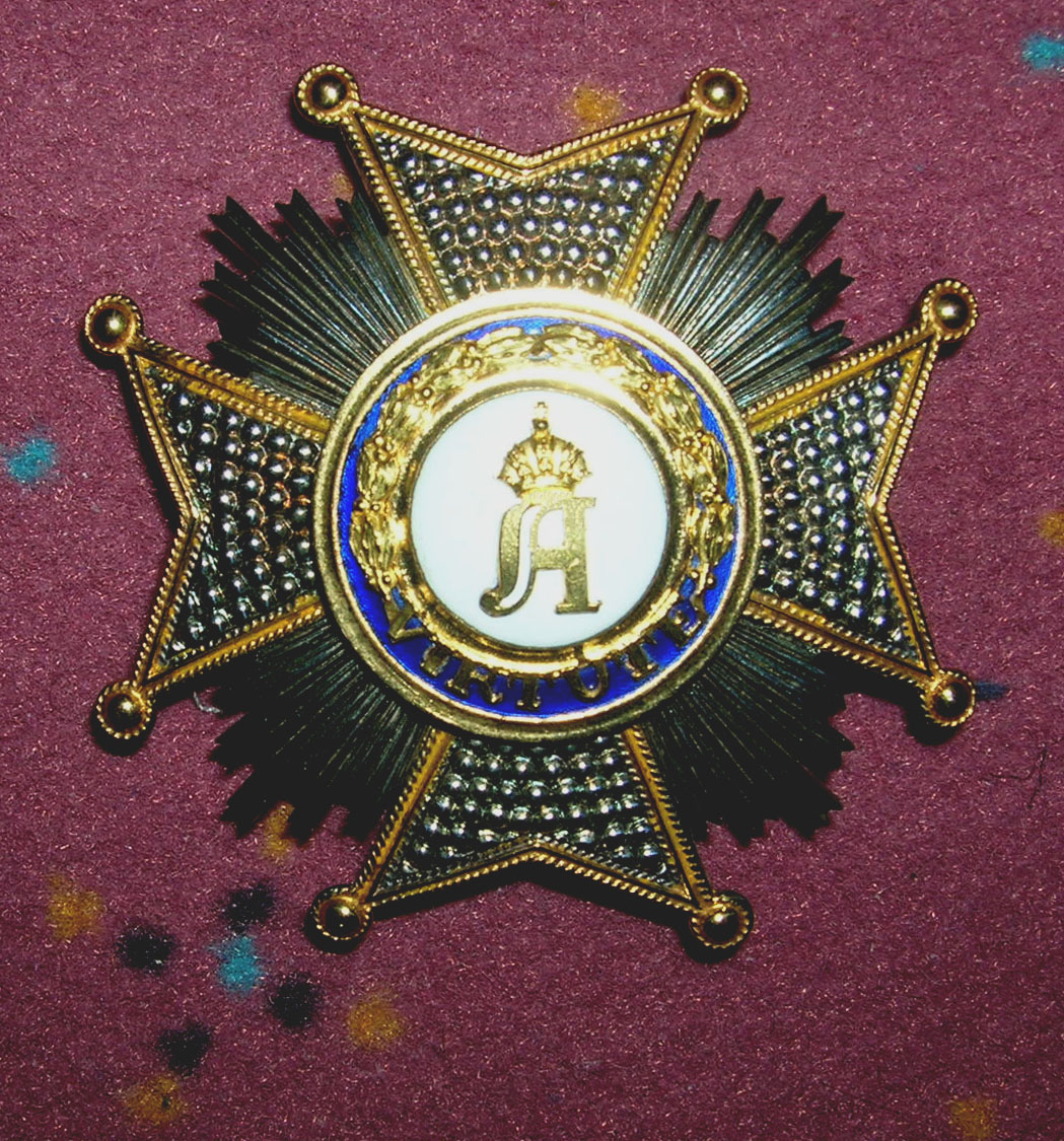 Bijou vum Ordre Adolphe de Nassau